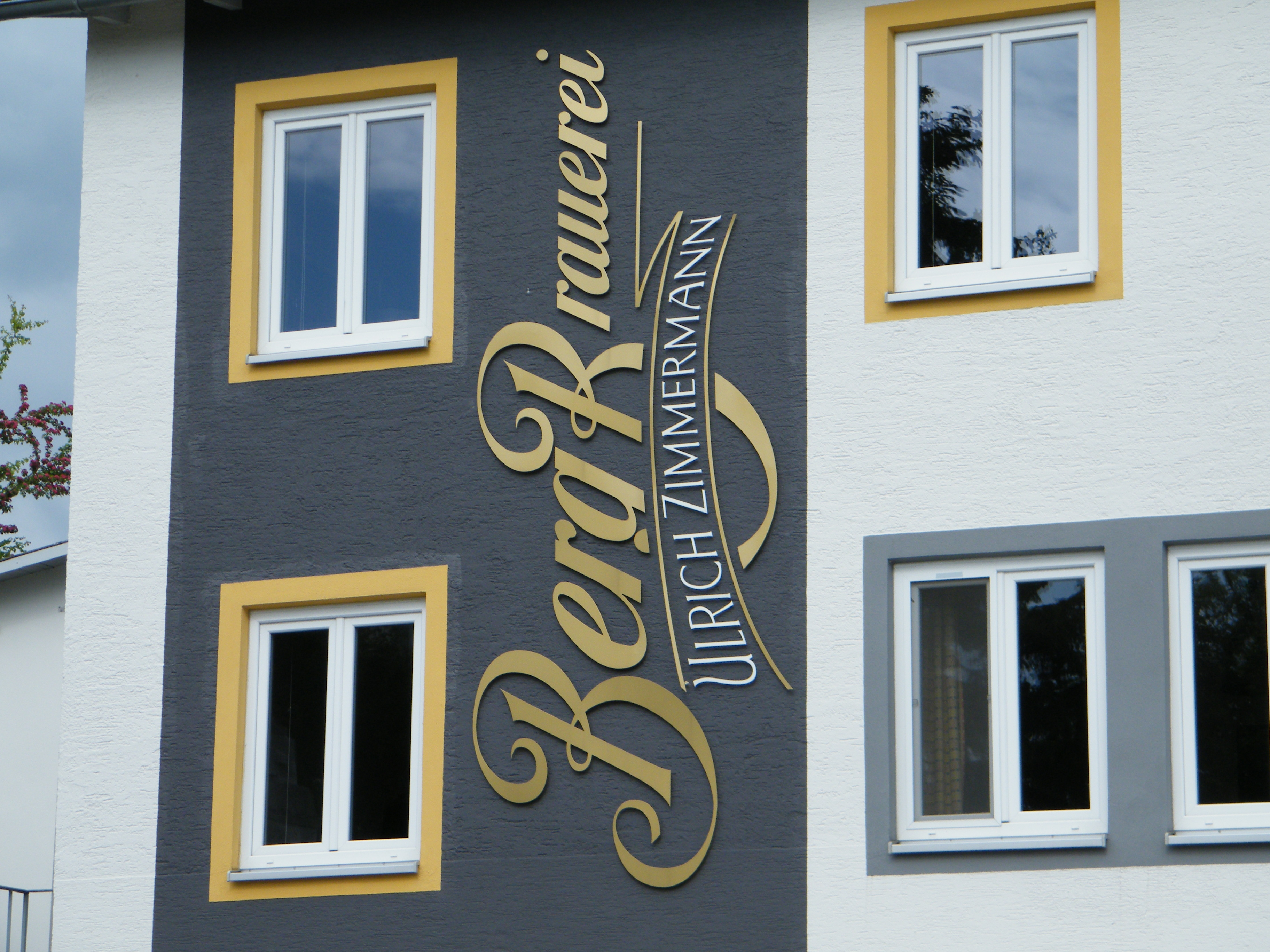 Aufnahme von Bergbier Brauerei in Ehingen.